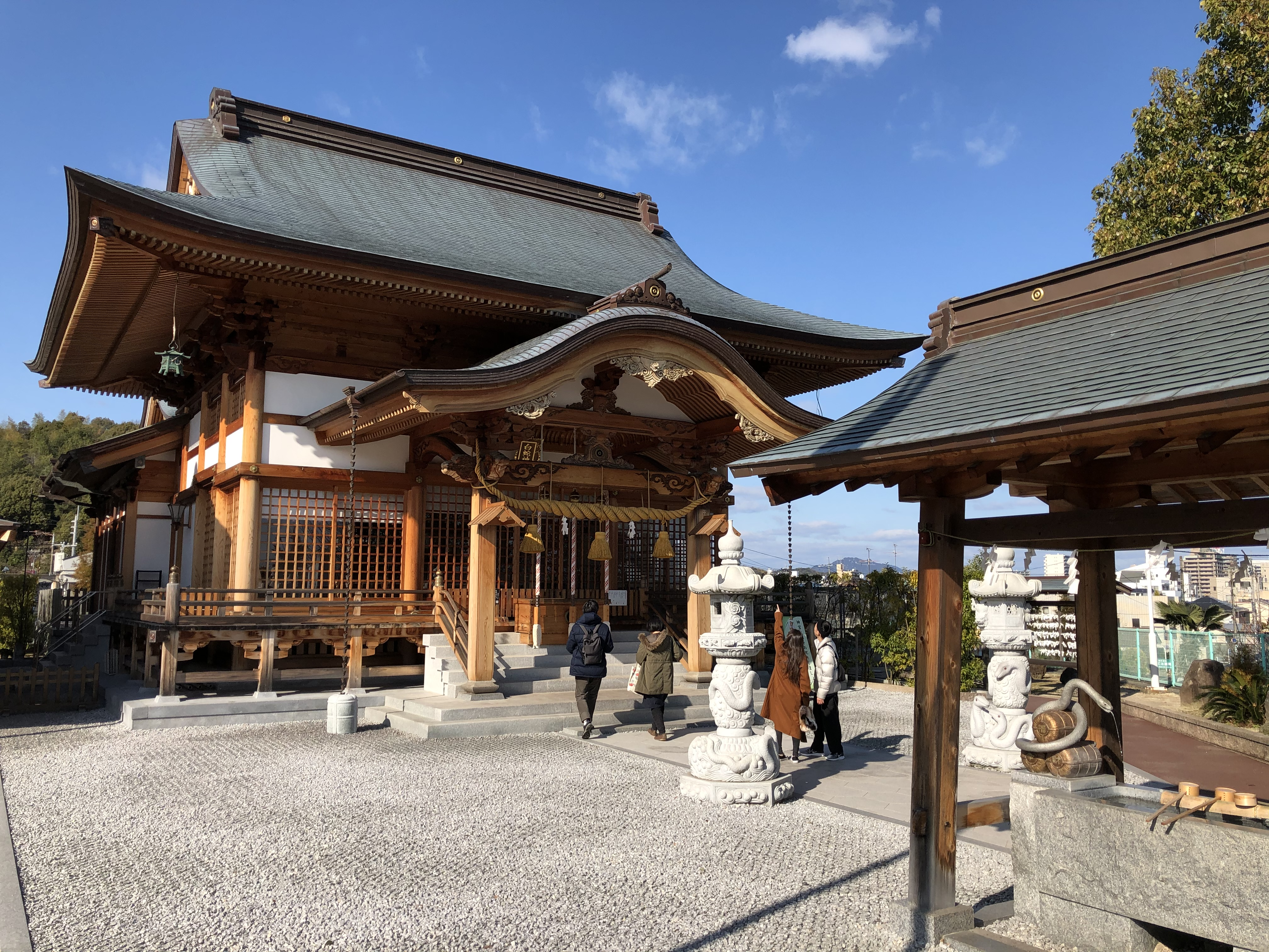 岩国市の白蛇神社